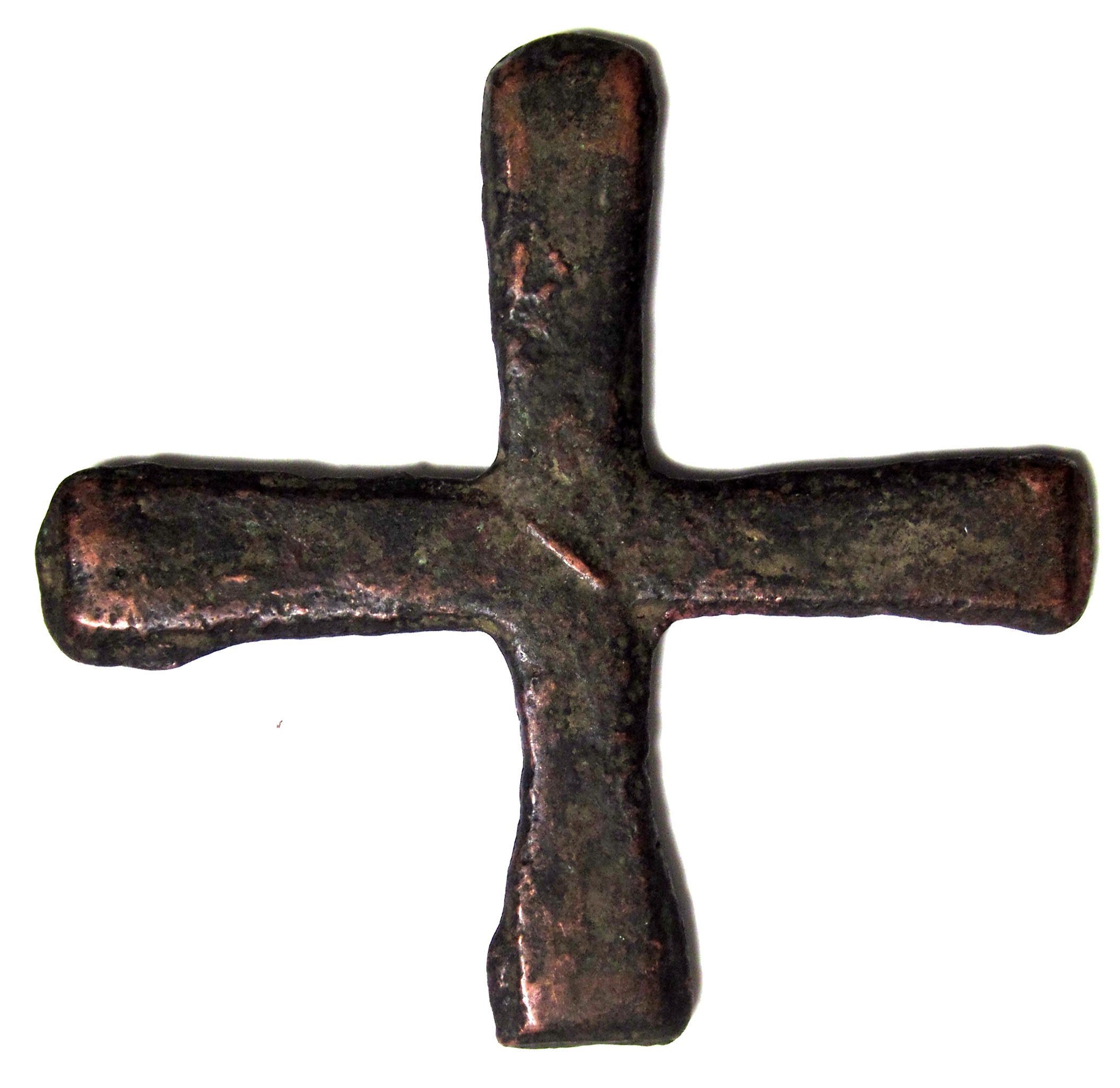 Katanga-Kreuz, Primitivgeld, Sambesi-Gebiet, Kupfer 531g, 183 x 187 x 8mm